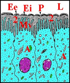 Epithélium et cuticule de la paroi du tube séminifère de Telema tenella au microscope électronique à transmission. Schéma.